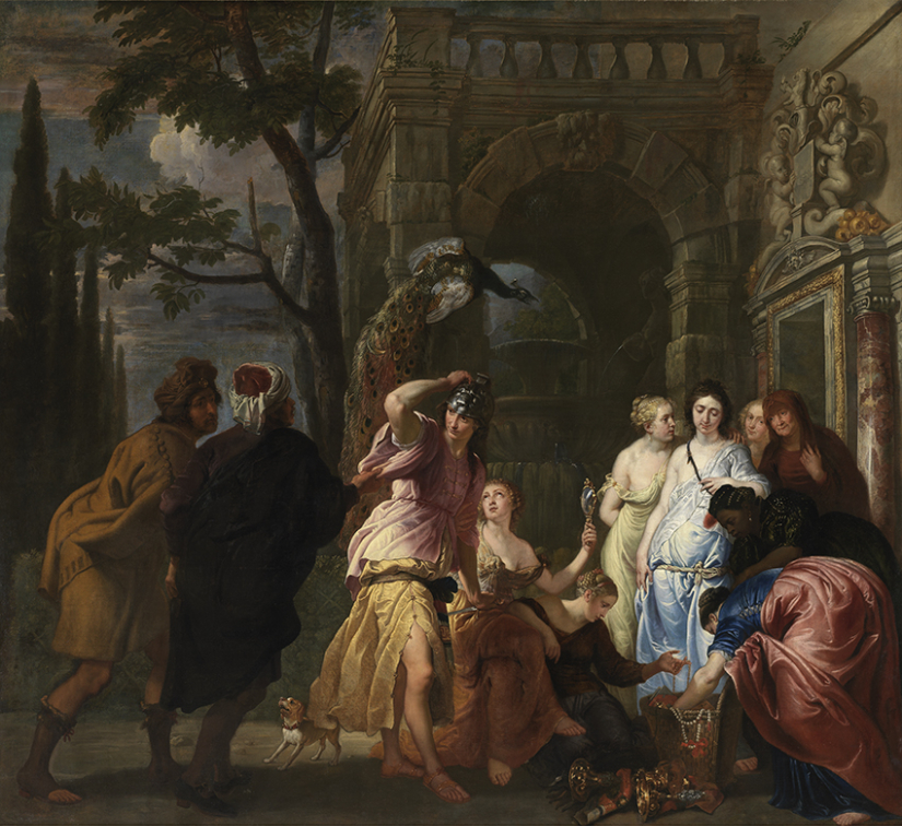 Achilles en de dochters van Lycomedes (Erasmus (II) Quellinus, 1643); collection: Musea Brugge - Groeningemuseum